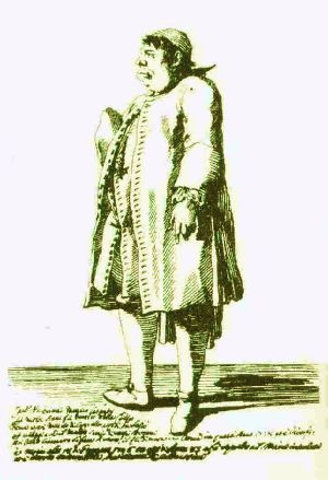 Il castrato cantante d'opera Valeriano Pellegrini (1663-1746) in una caricatura coeva